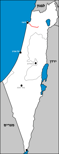 כבישי 75